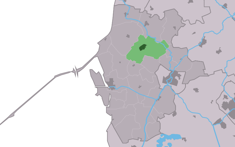 Kaartsje fan himrik fan Wytmarsum